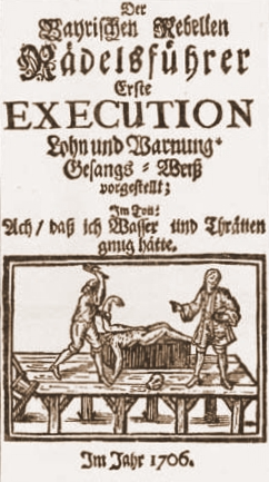 Munich, 1706: Execution of Johann Georg_Kittler (Kidler) and other rebels of Sendlinger Mordweihnacht.